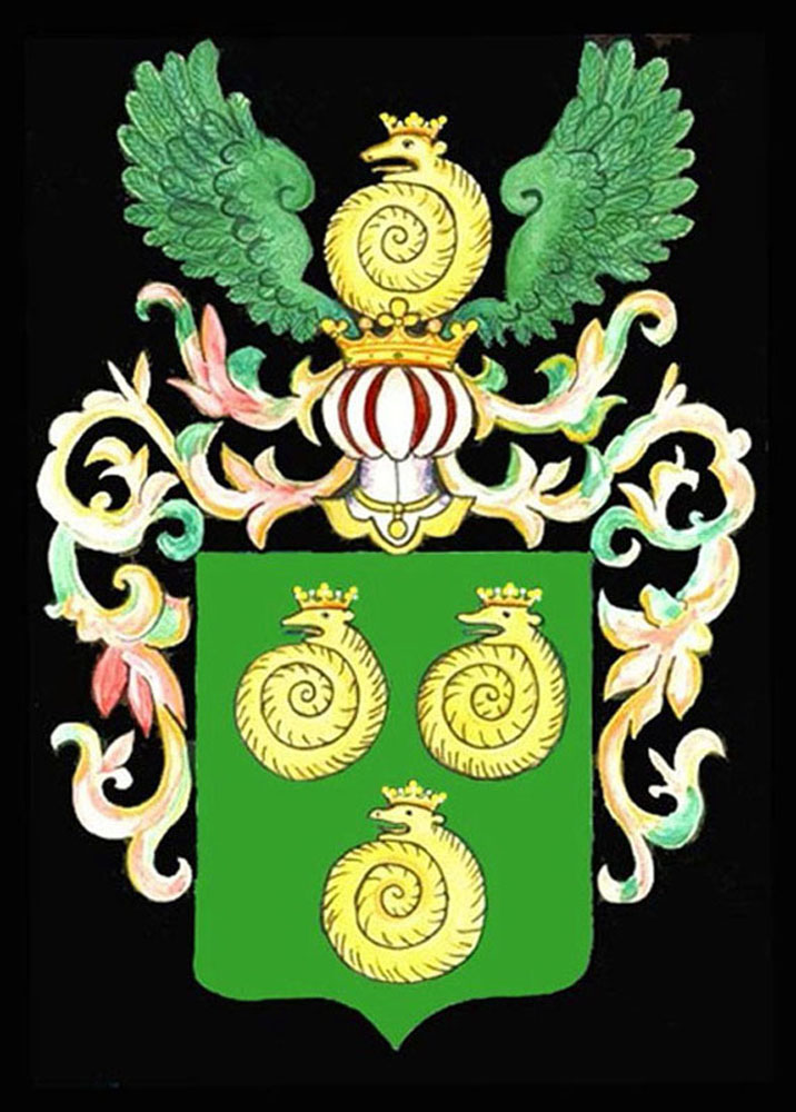 Герб Фонвизиных